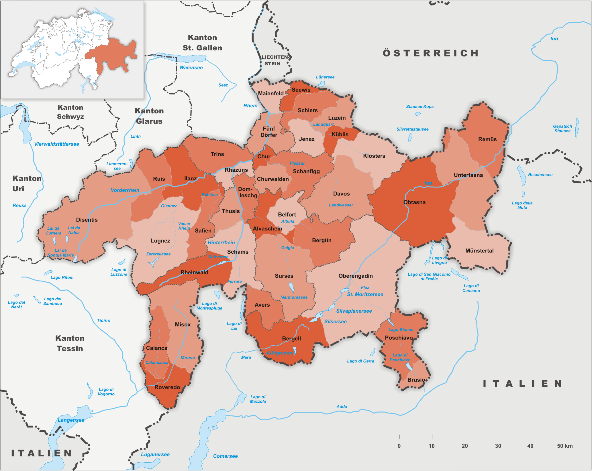 Kreise des Kanton Graubünden